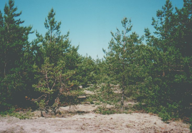 Pines on Aegna (island of Estonia). Aegna - borovice na písčinách Lemmiku kael.